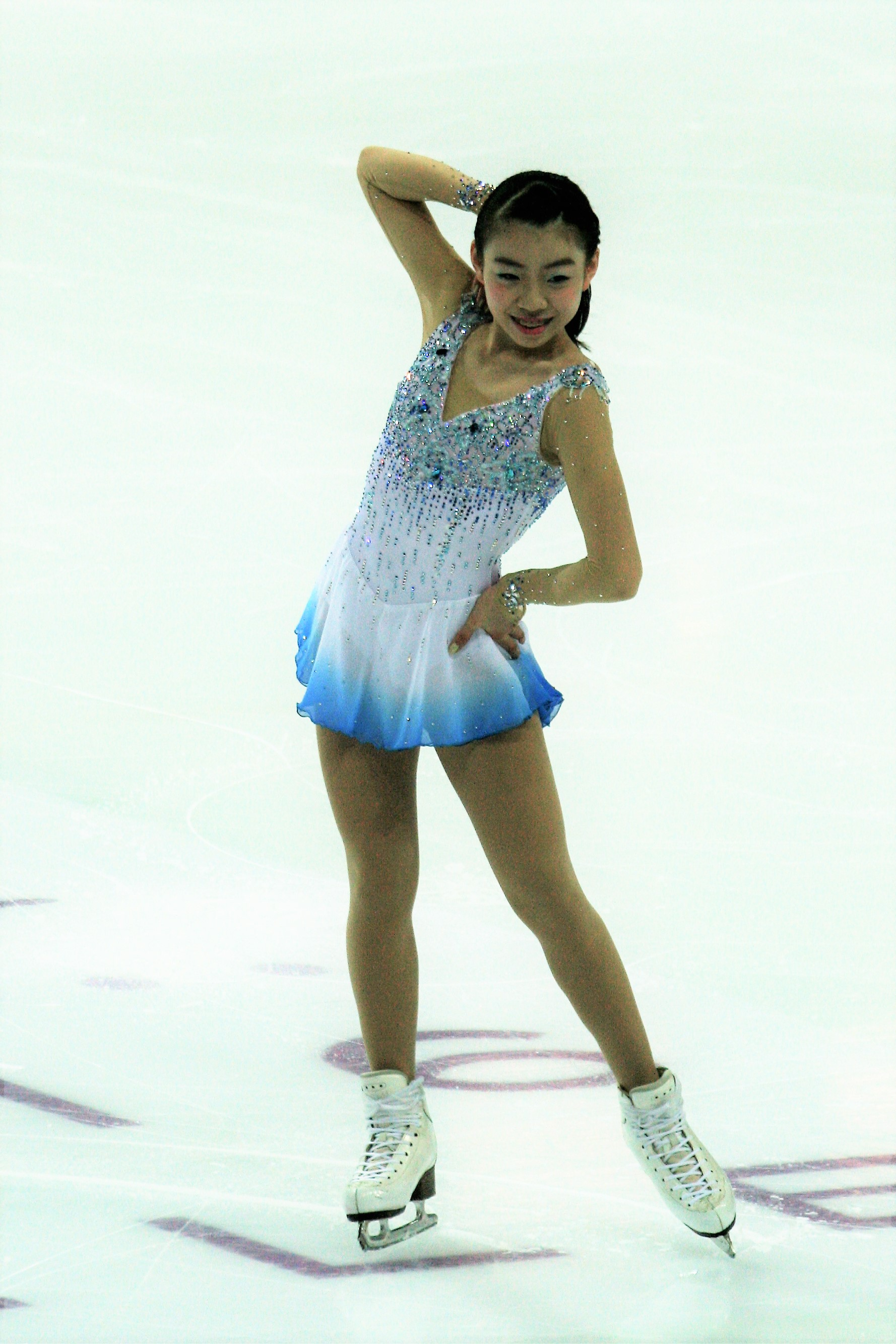 Рика Кихара (Япония) на финале Гран-при по фигурному катанию среди юниоров 2016-2017